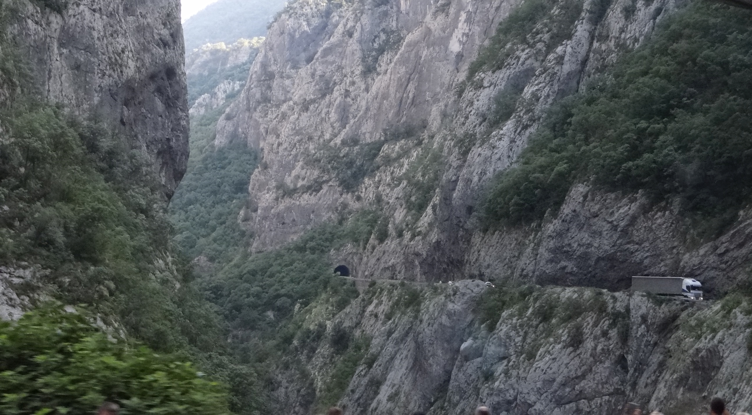 Morača River (kanion)